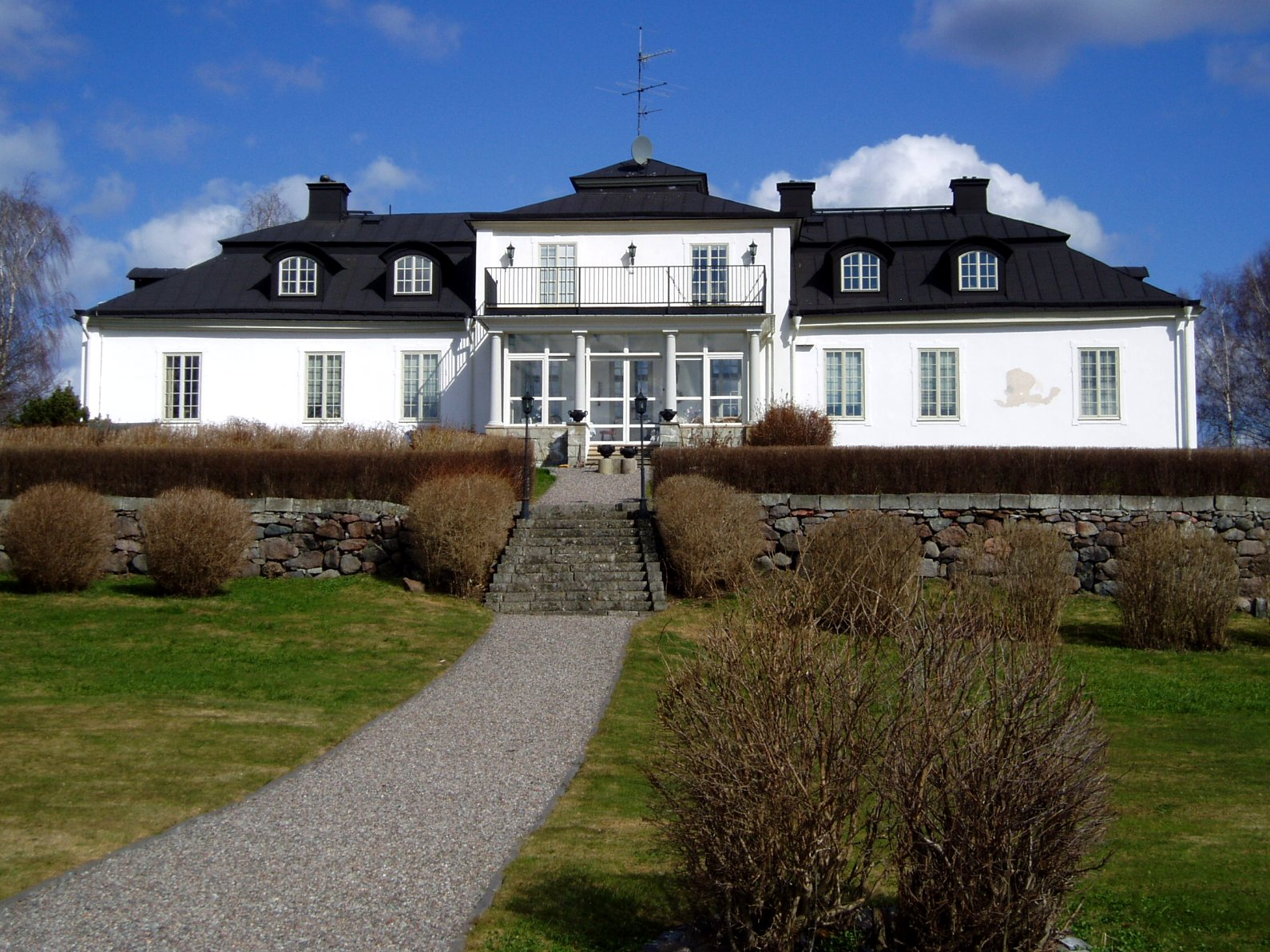 Tuna gård, Österkär